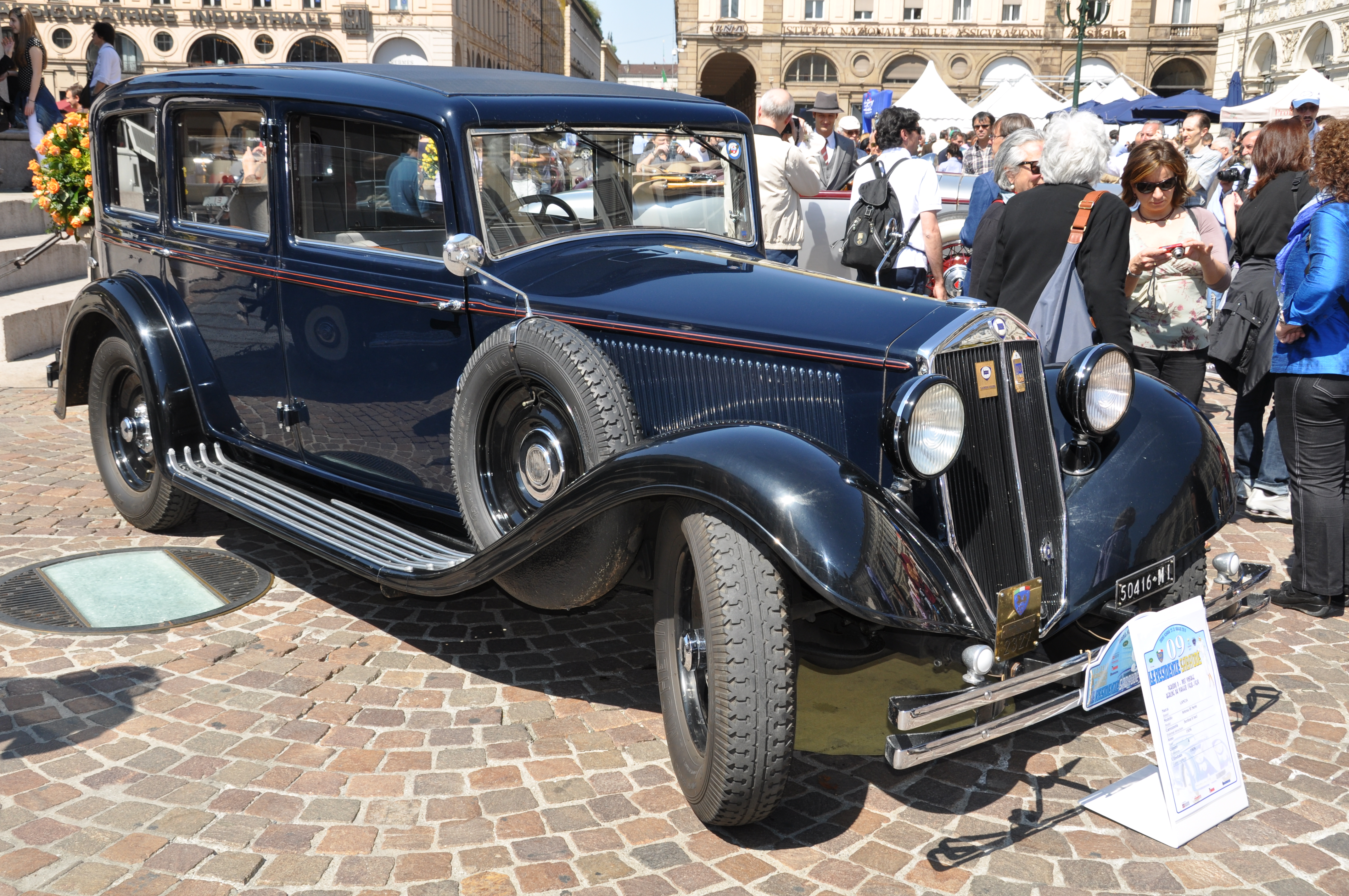 1934 Lancia Artena III Serie Vintage cars (Le residenze sabaude)